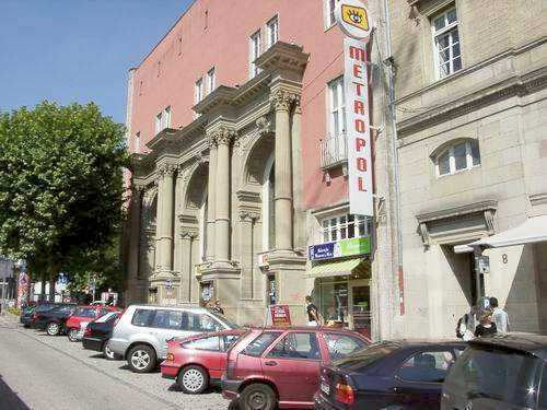 Stuttgart-Mitte, Bolzstraße: bauliche Überreste des frühern Stuttgarter Centralbahnhofs, links drei von ehemals fünf Portalbögen des Haupteingangs von 1867 (nach 1922 in Kino-Neubau einbezogen), rechts der in Einzelheiten veränderte Kopfbau von 1846